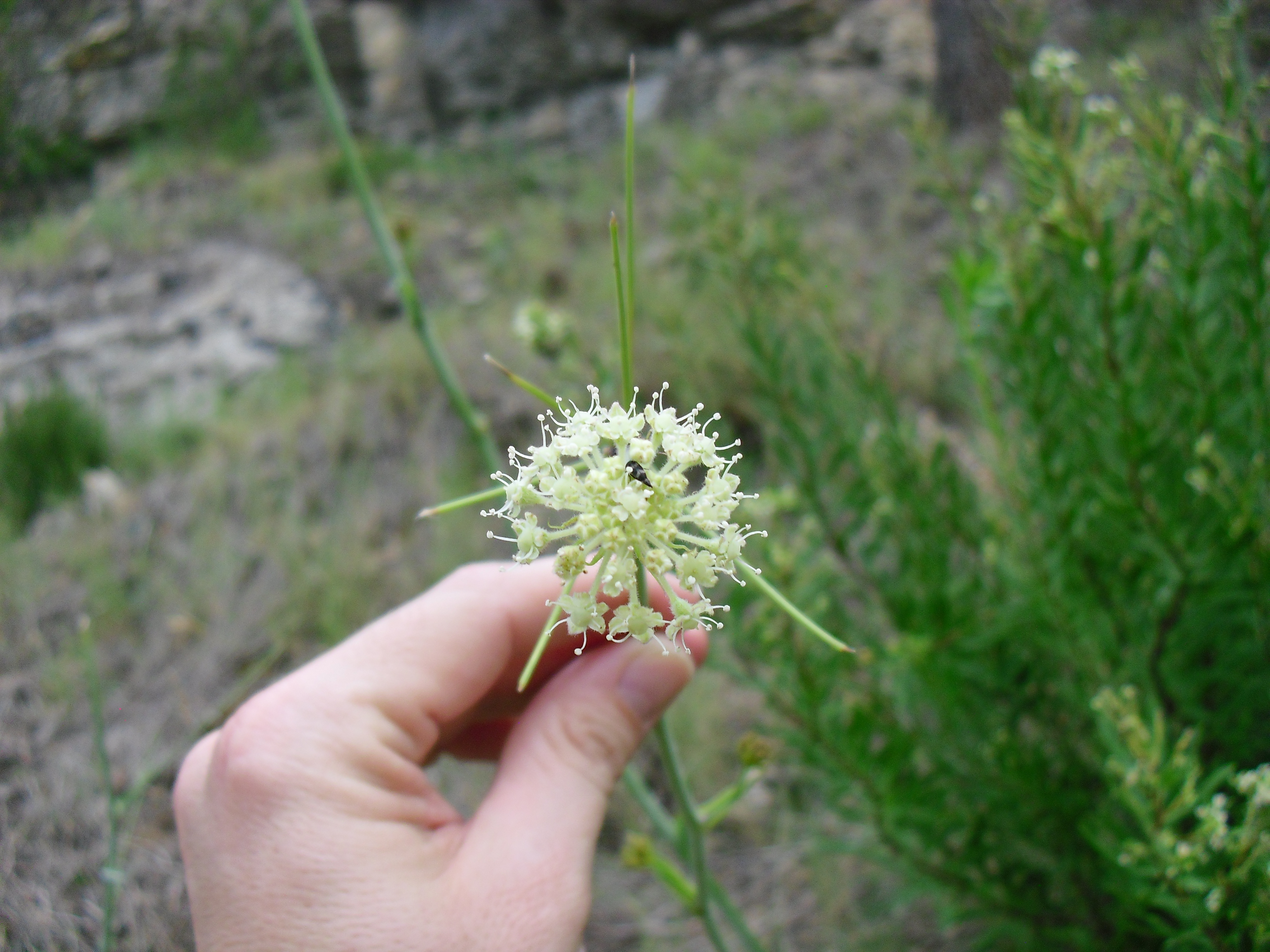 Guillonea scabra